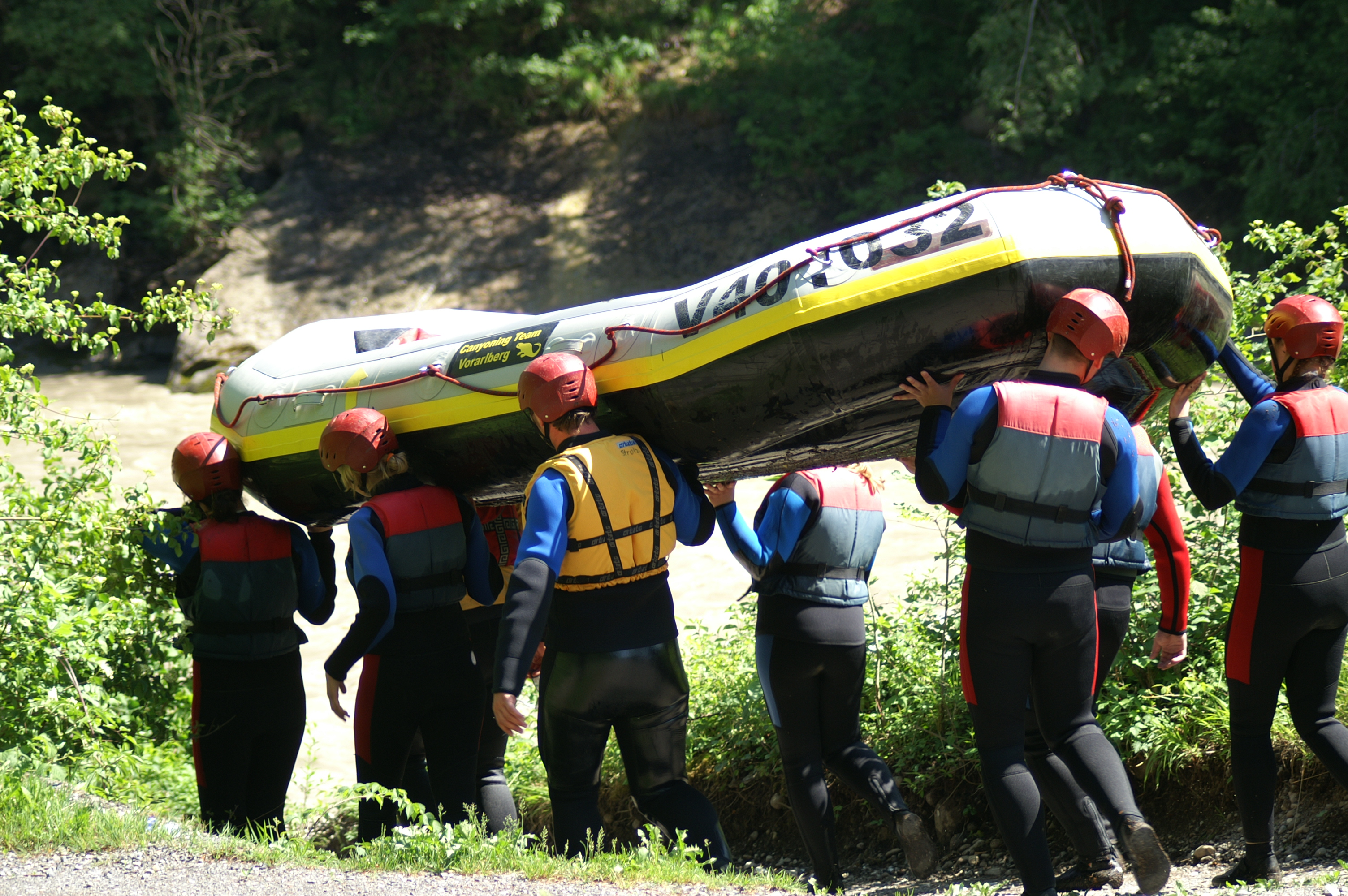 Rafting auf der unteren Bregenzer Ache - km69 - (Wolfurt, Kennelbach) Länge 9,5km, Schwierigkeitsgrad WW I-II